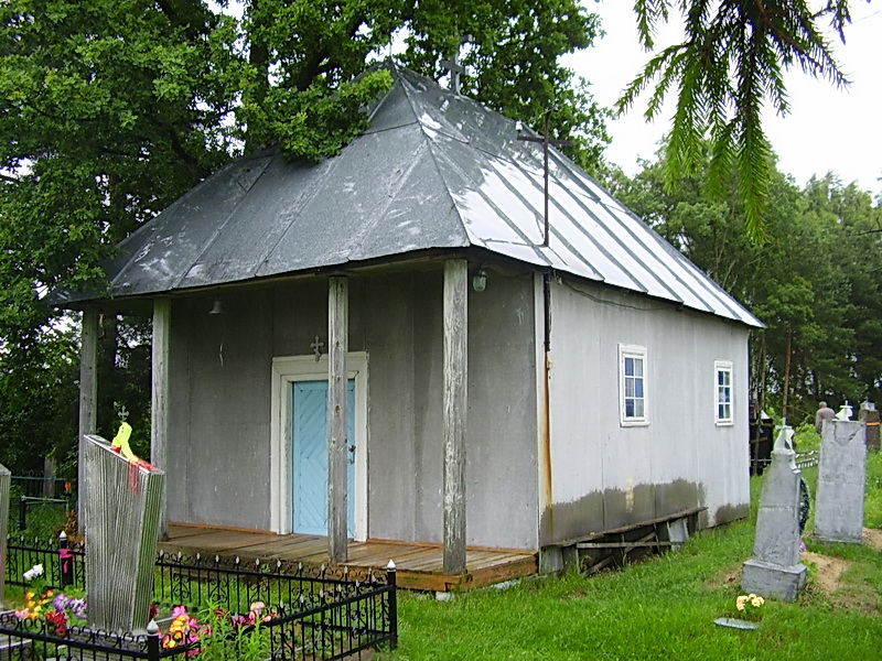 Нач. Царква Святога Міхаіла Арханёла